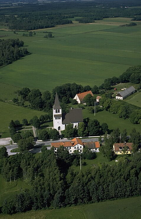 Motiv: Hejde kyrka Nyckelord: Flygbilder, Riksintressen Kategori: KyrkomiljöHejde kyrka